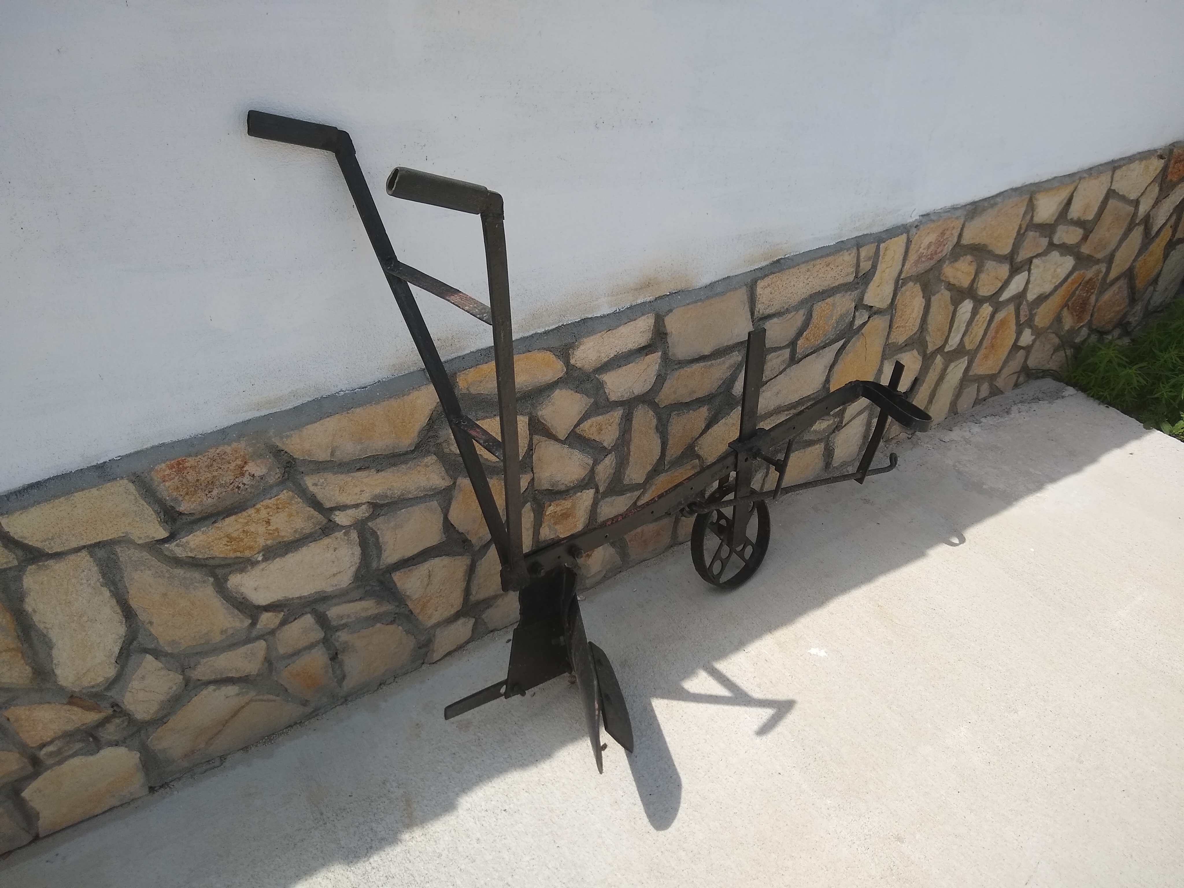 Рало.